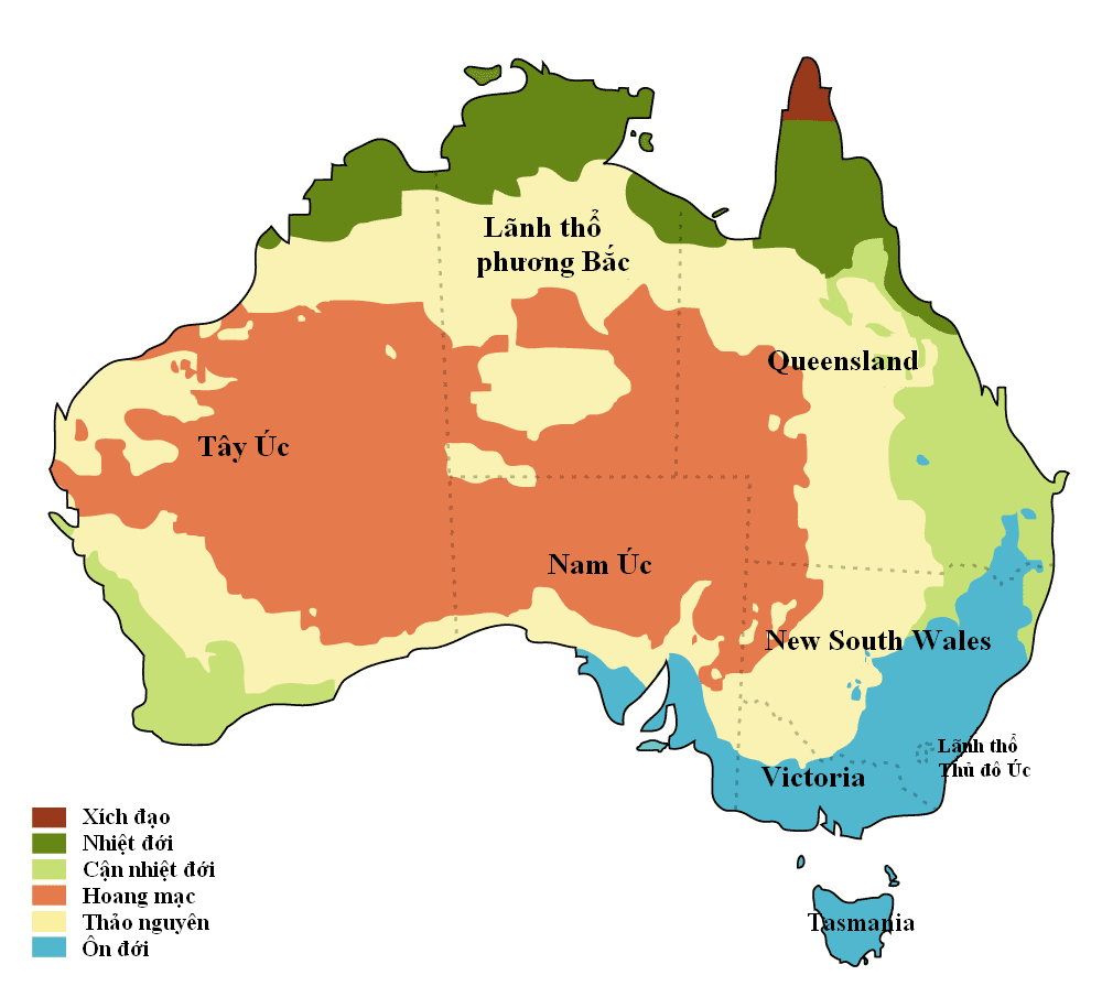 phân loại khí hậu của Cục khí tượng Úc.